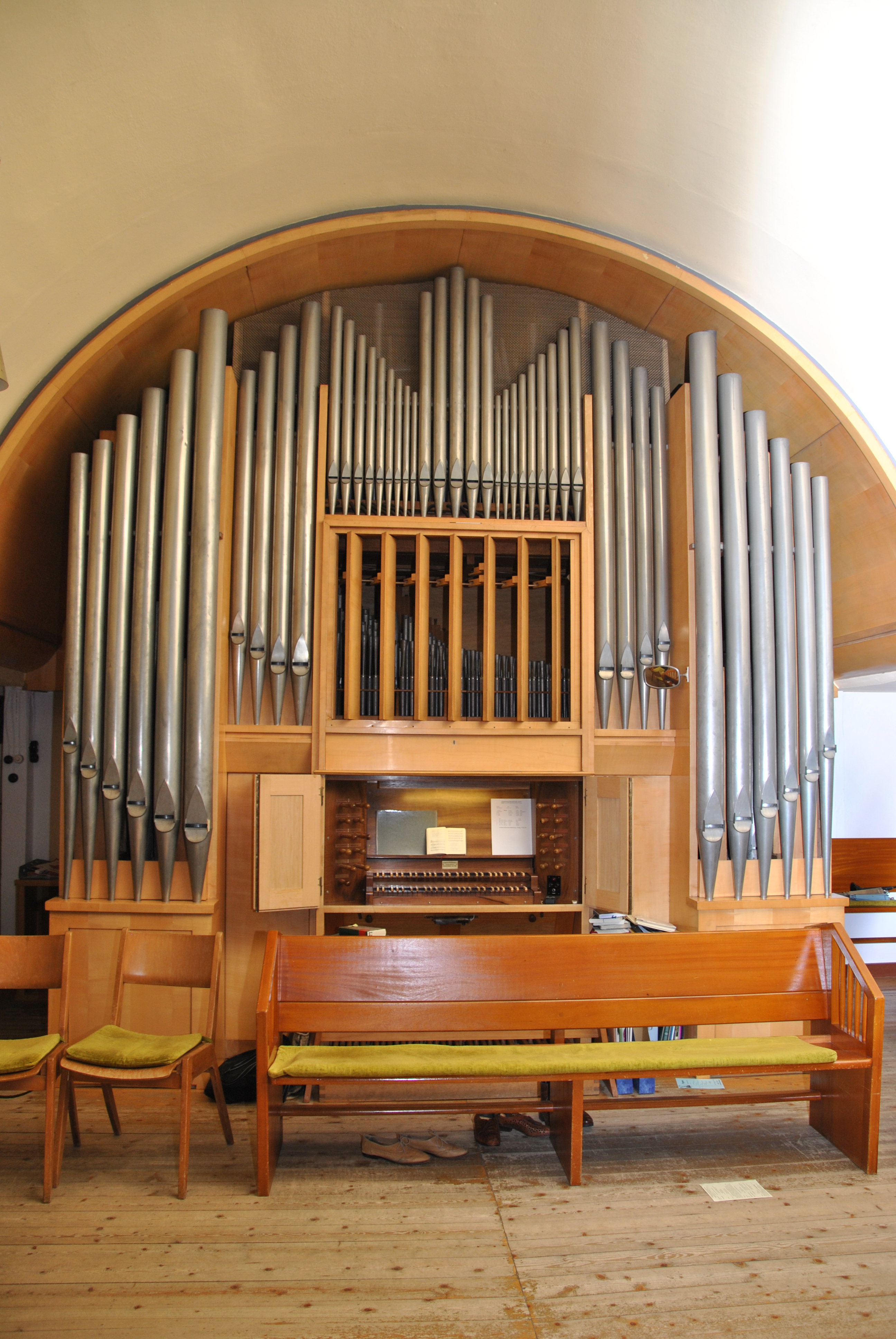 Die heuteige Orgel